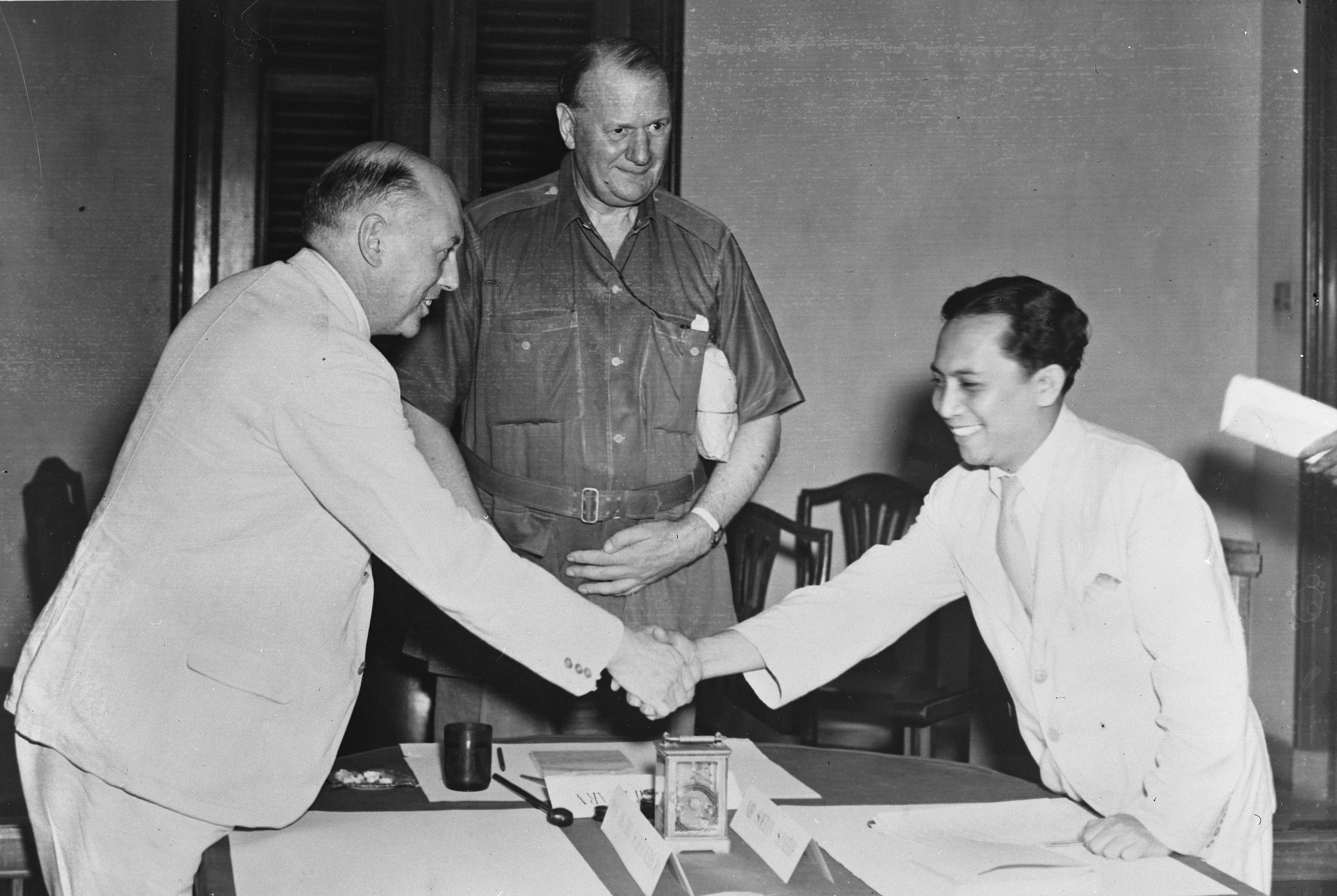 Collectie / Archief : Fotocollectie Anefo Reportage / Serie : [ onbekend ] Beschrijving : Besprekingen en ondertekening wapenstilstandsovereenkomst; Linggadjati conferentie met van links naar rechts: Schermerhorn, Lord Killearn en Sutan Sjahrir Datum : 14 oktober 1946 Locatie : Batavia, Indonesië, Indonesië, Nederlands-Indië Trefwoorden : conferenties, ministers-presidenten, overeenkomsten Persoonsnaam : Killearn Lord, Schermerhorn, Willem, Sjahrir Sutan Fotograaf : NIGIS [Netherlands Indies Government Information Service] Auteursrechthebbende : Nationaal Archief Materiaalsoort : Glasnegatief Nummer archiefinventaris : bekijk toegang 2.24.01.09 Bestanddeelnummer : 901-9430